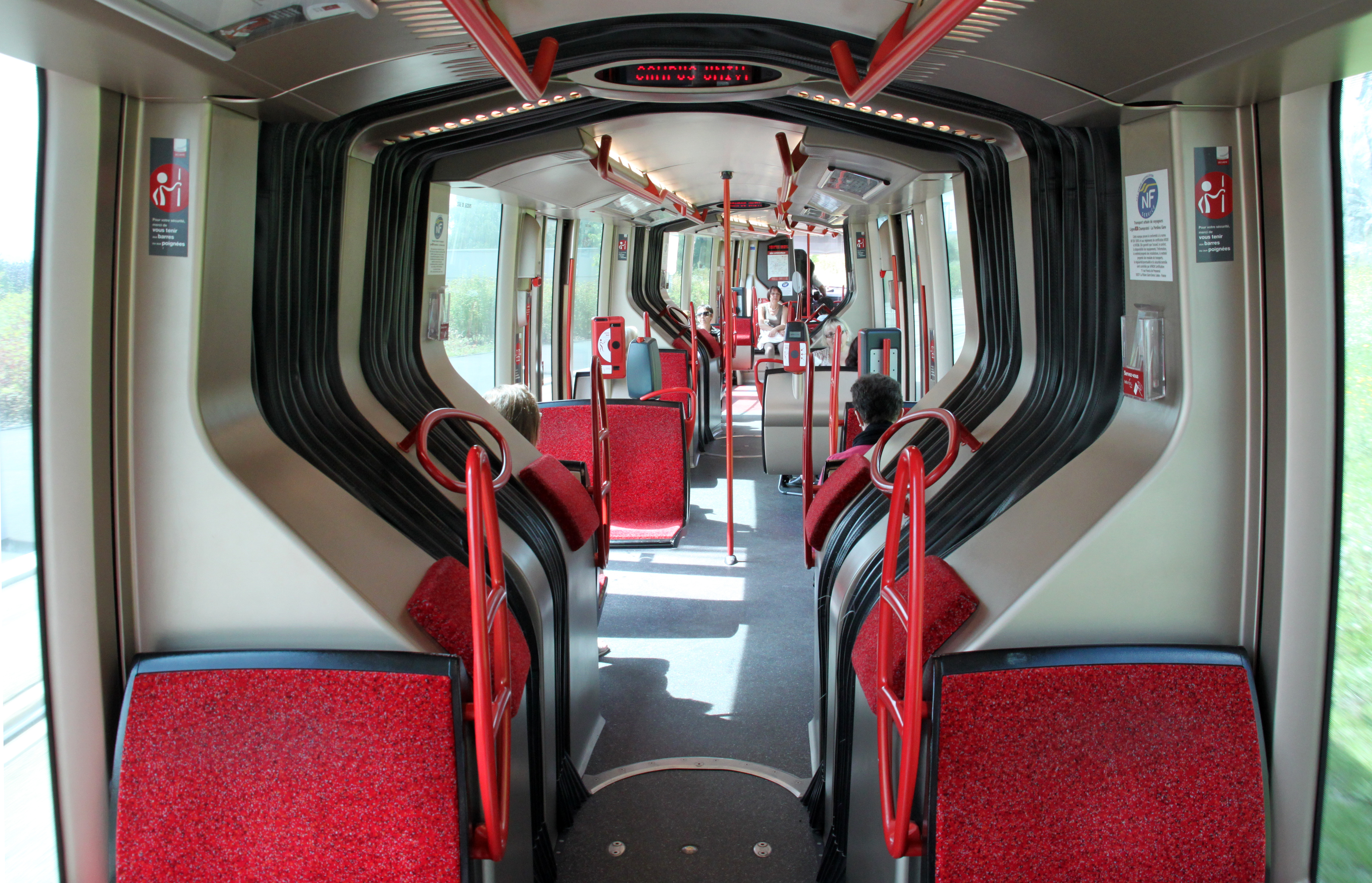 Interieur van een Translohr-tram in Clermont-Ferrand.